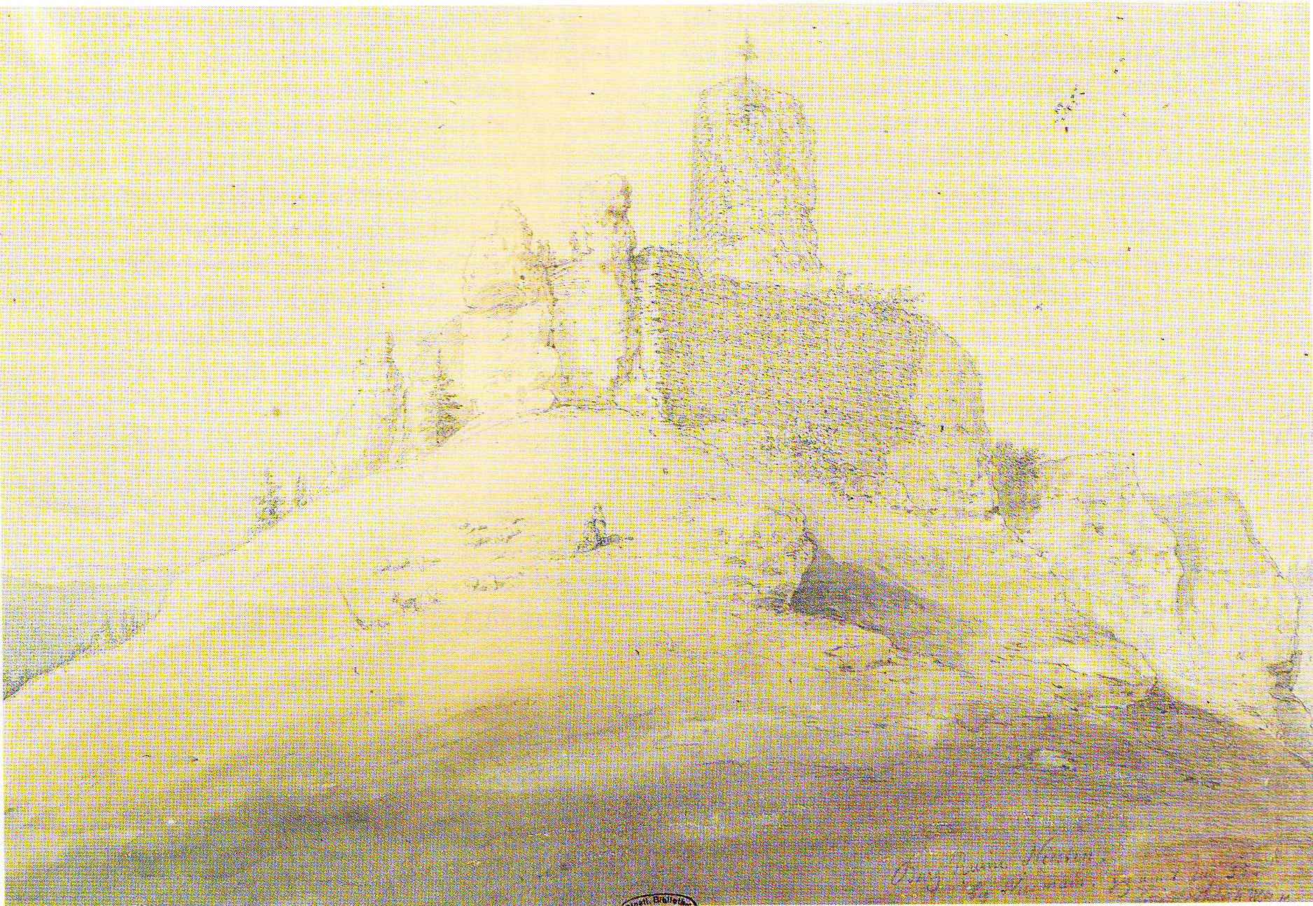 Burgruine Niesten, Aquarellierte Zeichnung aus dem Jahr 1835 von Carl August Lebschée (1800-1877)